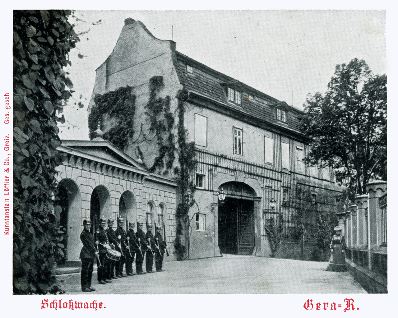 Schlosswache des Inf.-Reg. Nr. 96, Schloss Osterstein, Gera